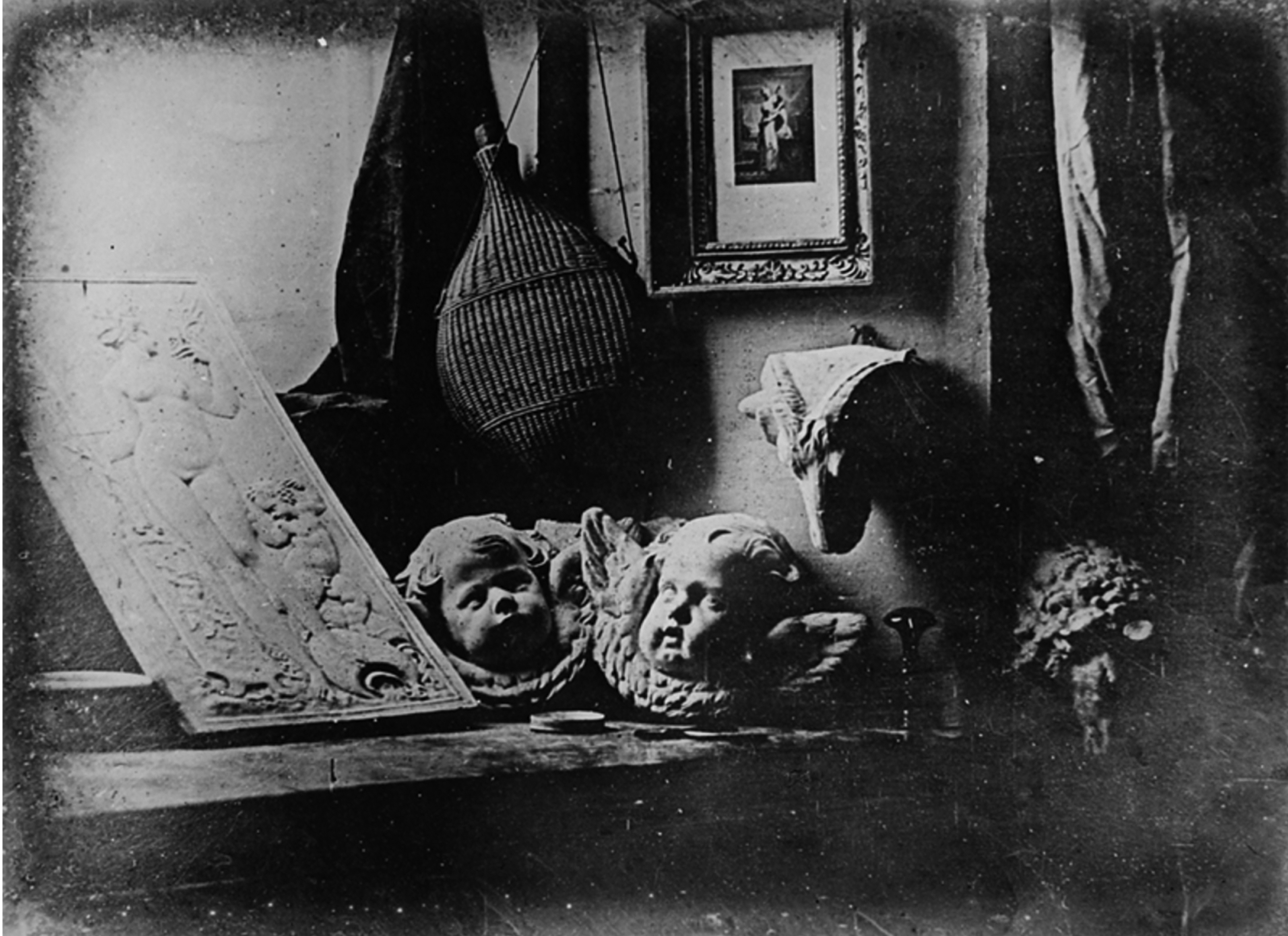 L’Atelier de l'artiste : un daguerréotype de 1837, réalisé par l’inventeur de ce procédé photographique, Louis Jacques Mandé Daguerre (1787-1851).